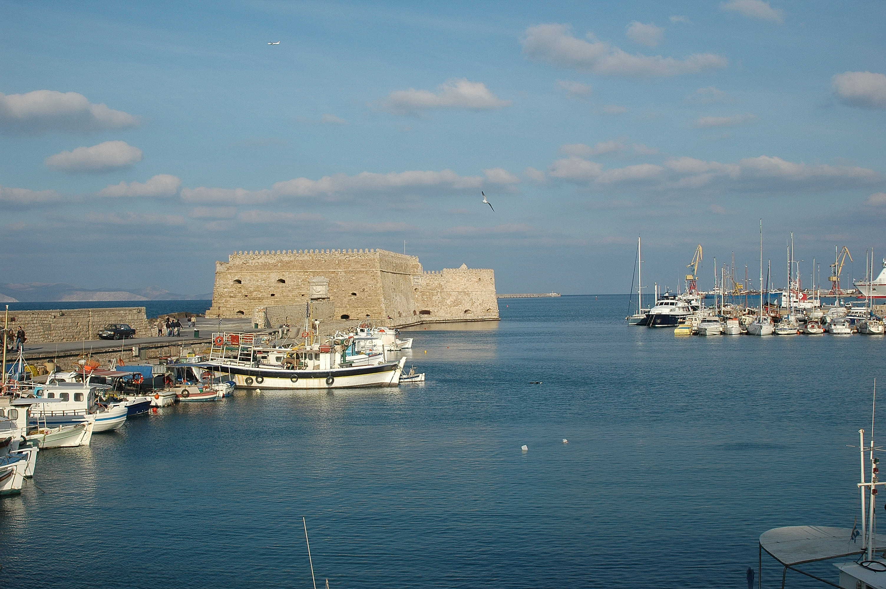 Photo du port d'Heraklion et de la forteresse vénitienne, prise par Harrieta171 le 29/01/2006.